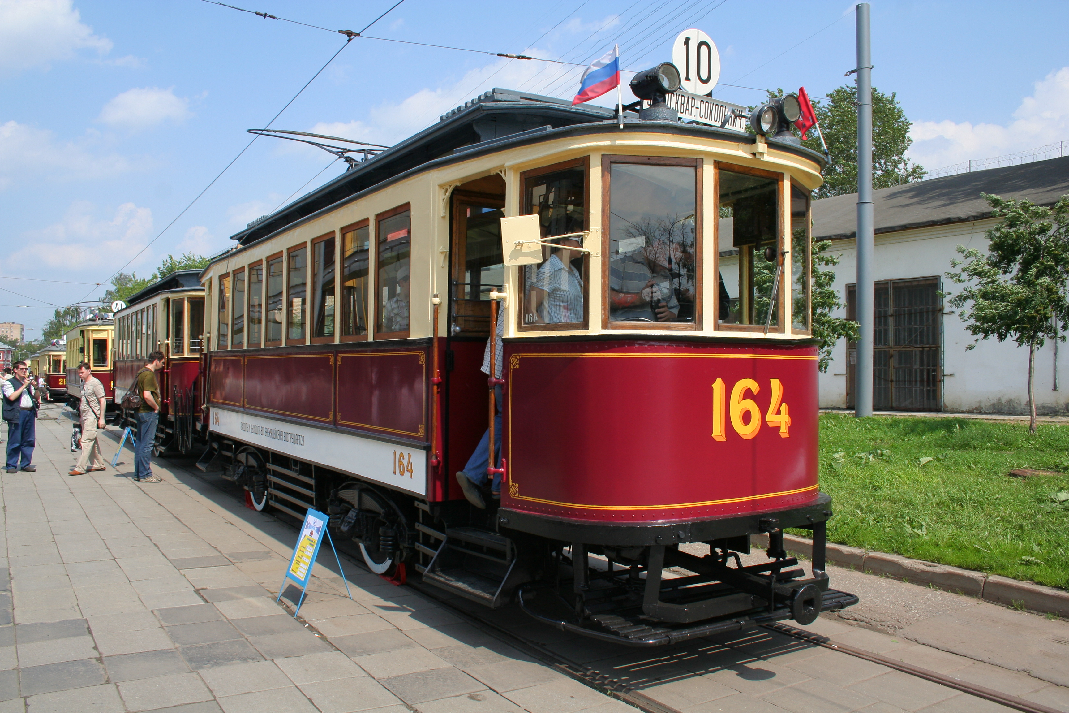 Ретро-трамвай Мосгортранса Ф Коломенского завода на показе около Депо им. Баумана 12 июня 2010 года.